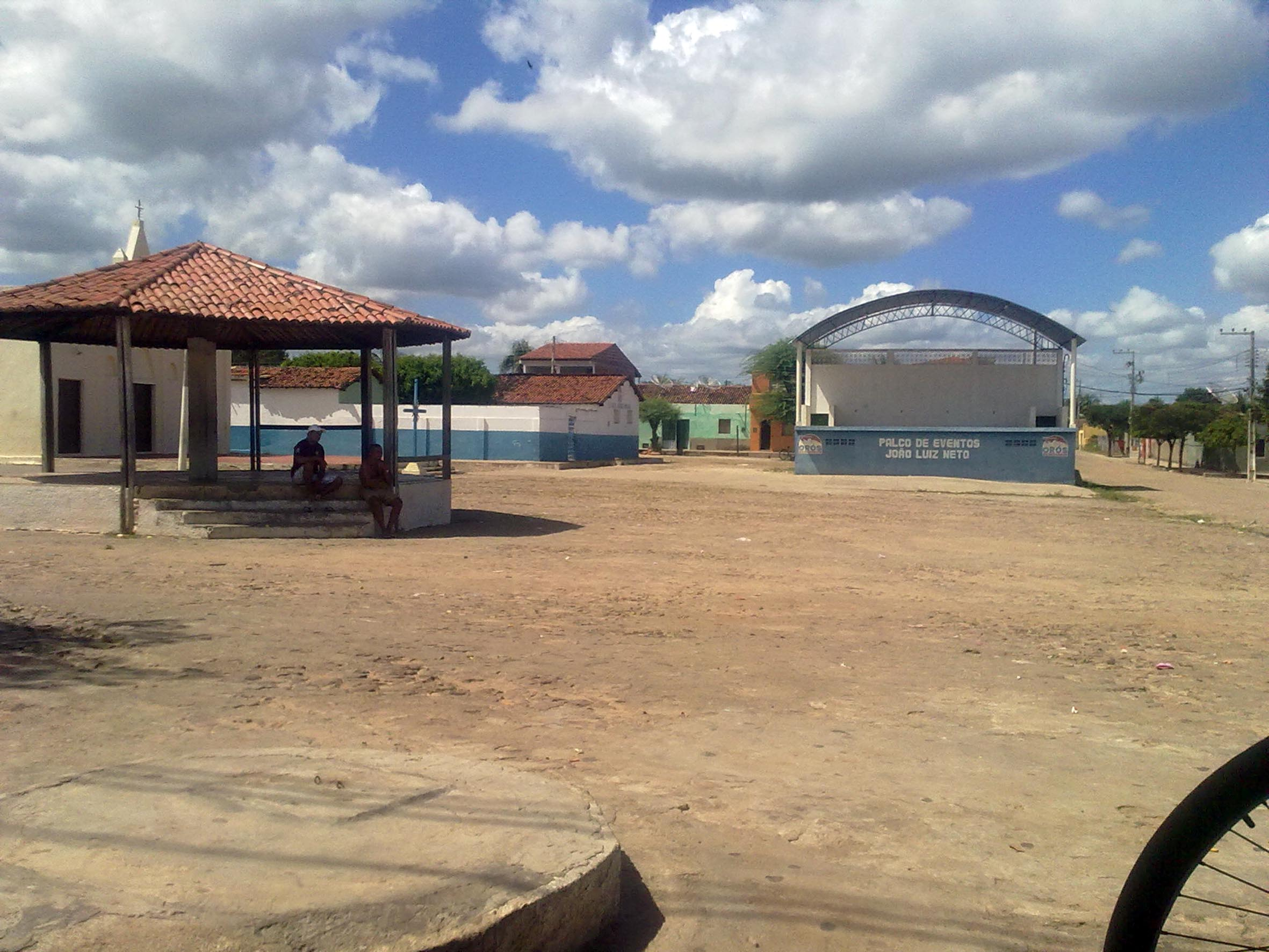 imagem do centro de guassussê - ceará - brasil.